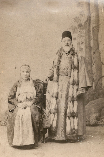 Саади Леви Ешкенази